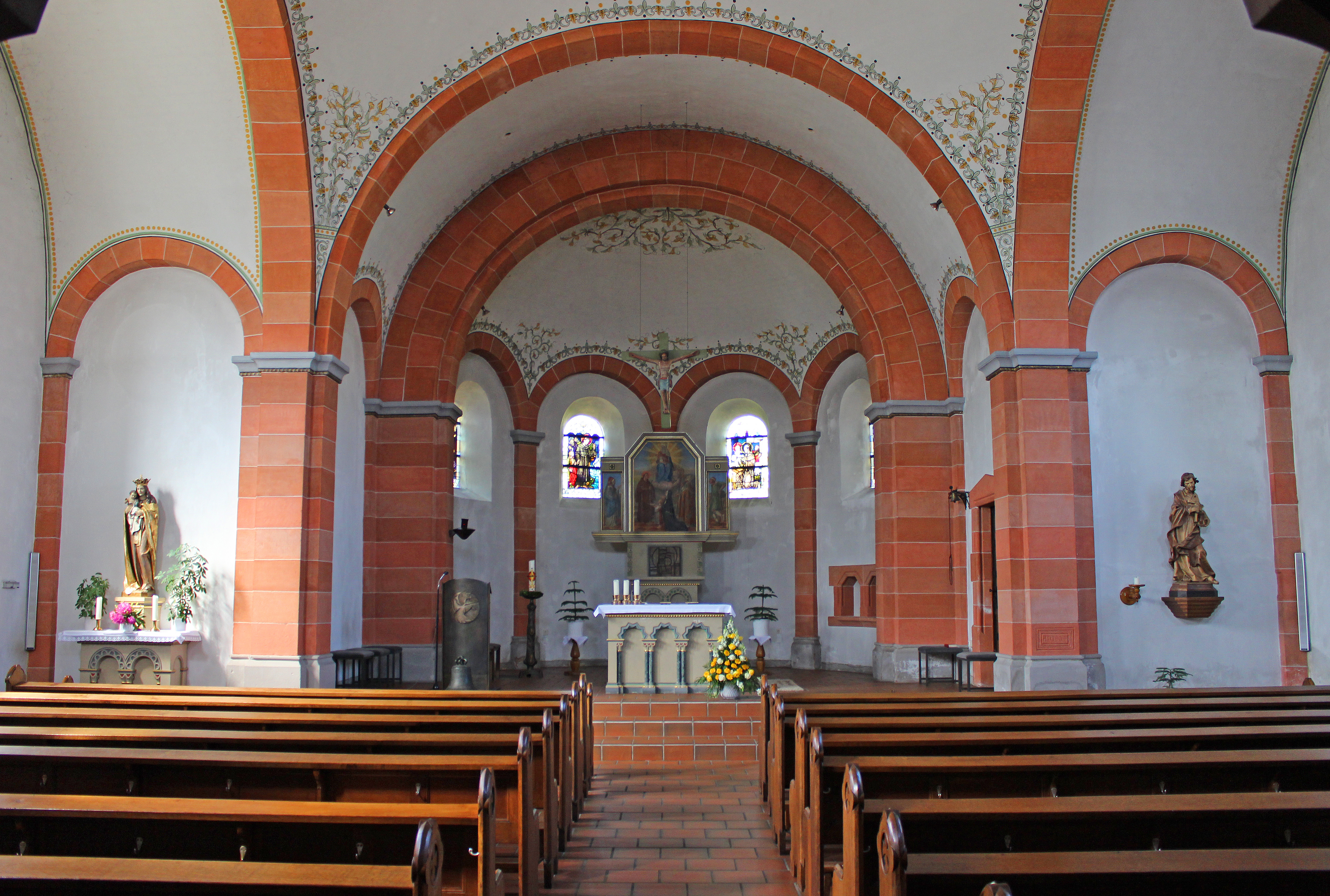 Blick ins Innere der katholischen Filialkirche St. Antonius von Padua in Niedersaubach, einem Stadtteil von Lebach, Landkreis Saarlouis, Saarland